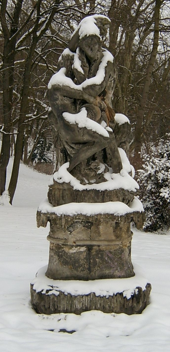 Sandsteinplastik Mythologische Figurengruppe in Frankfurt (Oder). Sie steht am Rand des Lennéparks direkt an der Rosa-Luxemburg-Str. Im Oktober 2006 wurde sie zur Restaurierung nach Berlin transportiert um im Frühjahr 2007 wieder aufgestellt zu werden. Die Skulptur stammt aus dem 18. Jahrhundert und war ursprünglich vermutlich eine Brunnenplastik auf dem Hof eines gutbürgerlichen Hauses.